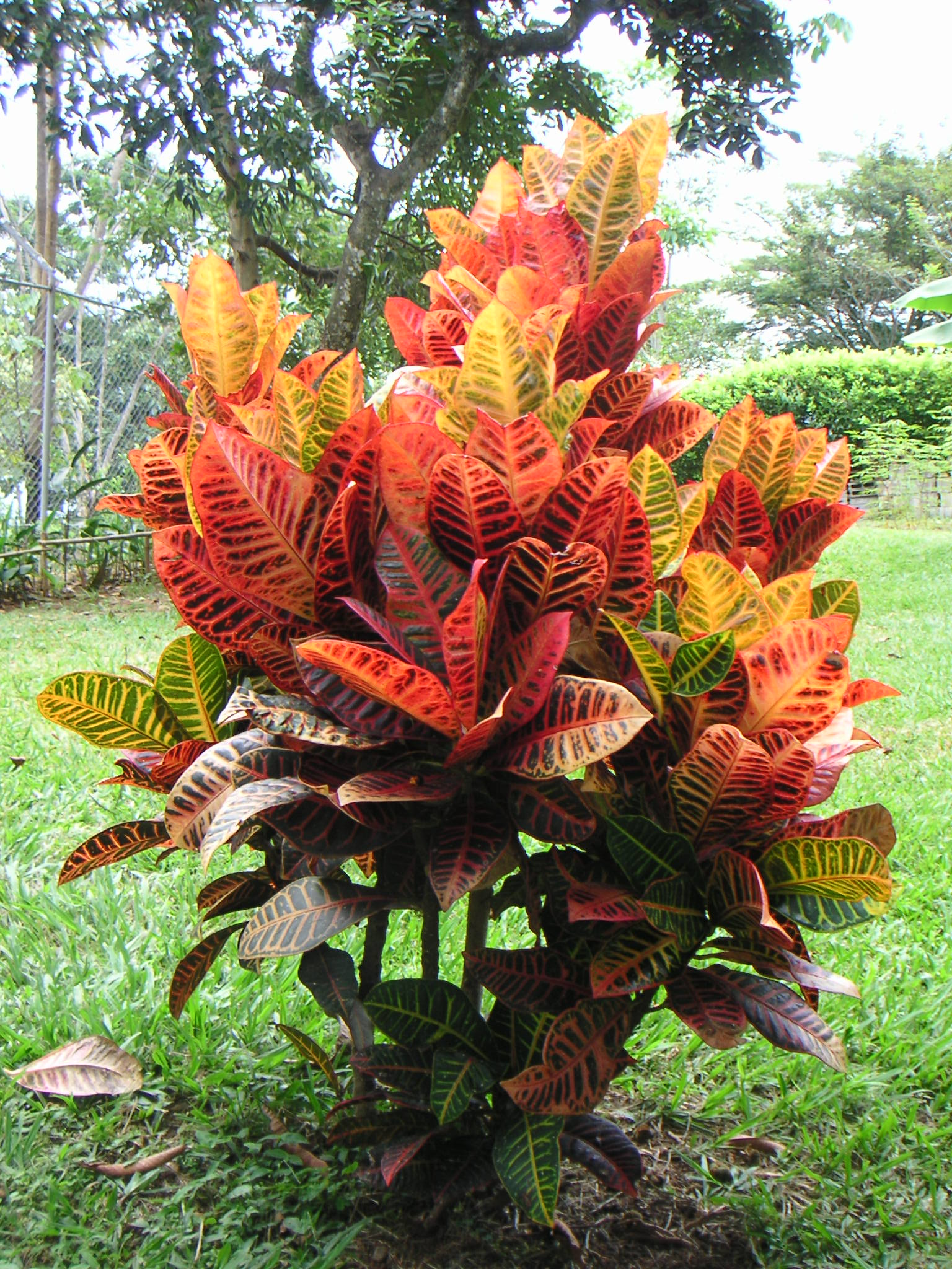 Codiaeum variegatum, Euphorbiaceae, Cali / Kolumbien